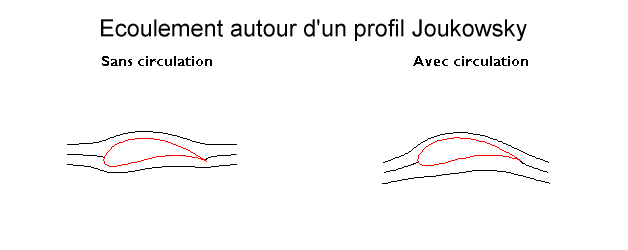 Ecoulement autour d'un profil Joukowsky, avec et sans circulation